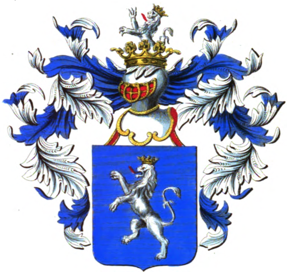 Armoiries de la famille van den Berghe de Binckum